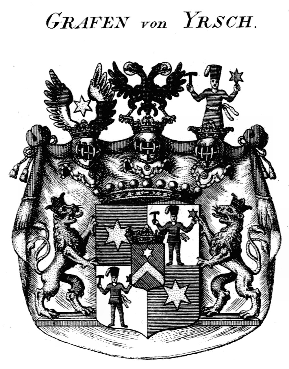 Wappen der pfalz-bayerischen Grafenfamilie von Yrsch